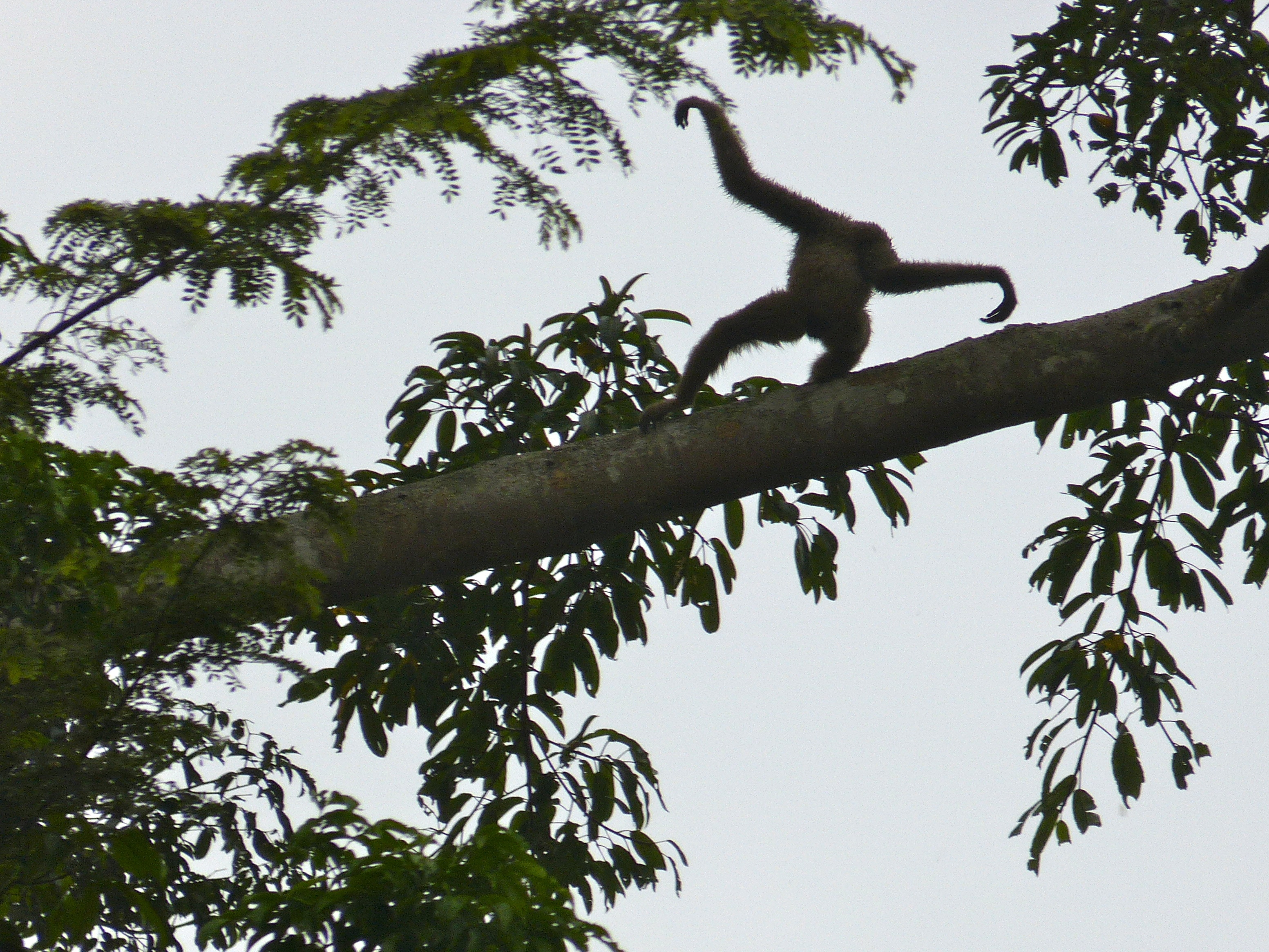 Kinabatangan River, Sabah, MALAYSIA